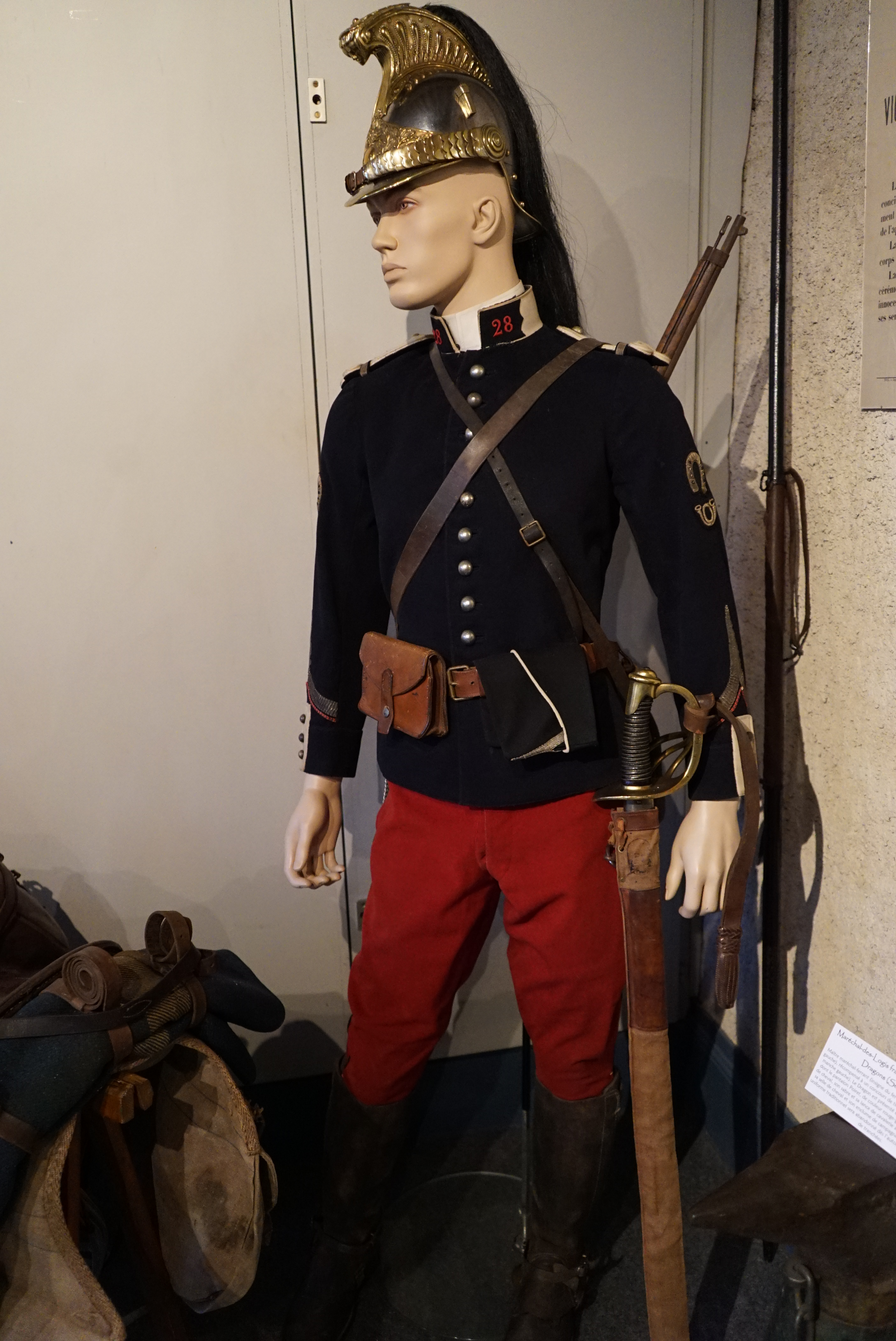 lors de l'exposition temporaire sur la Grande guerre.